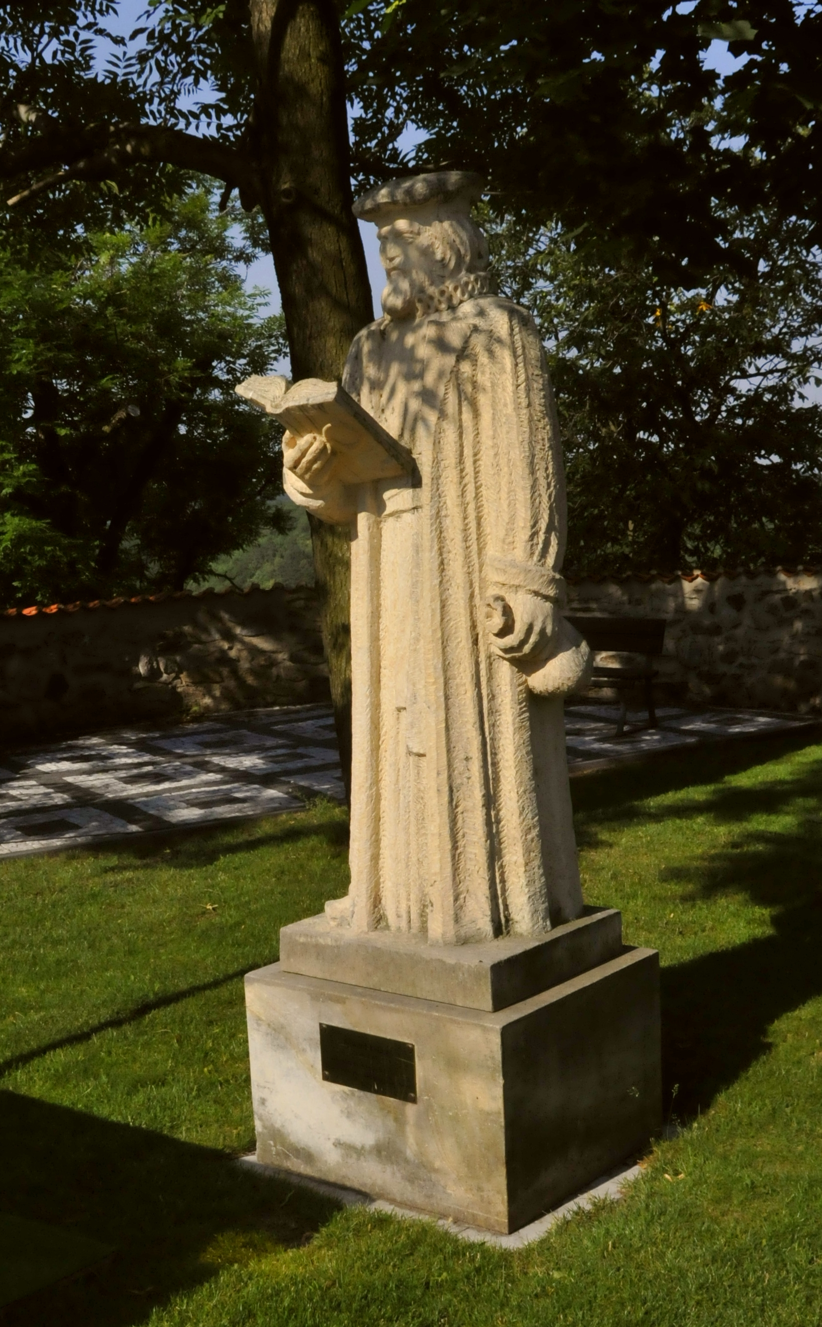 Edward-Kelley-Statue im Burgpark der Burg Hněvín in Most (Tschechien)